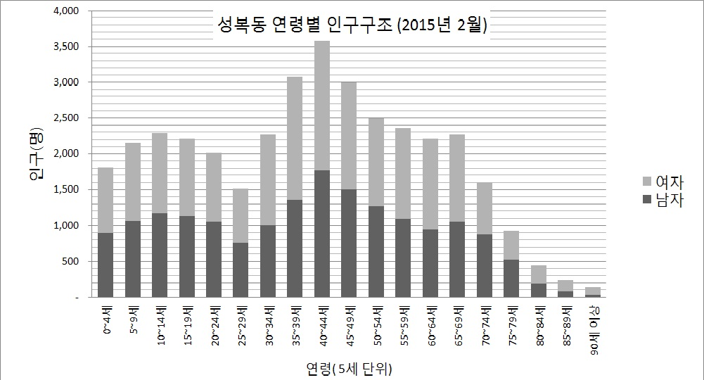 조선말: 용인시 성북동 연령별 인구구조(2015년 2월)